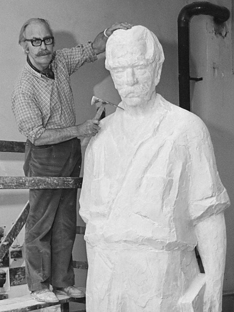 Beeld van Albert Schweitzer voor Deventer van Pieter de Monchy 14 mei 1974